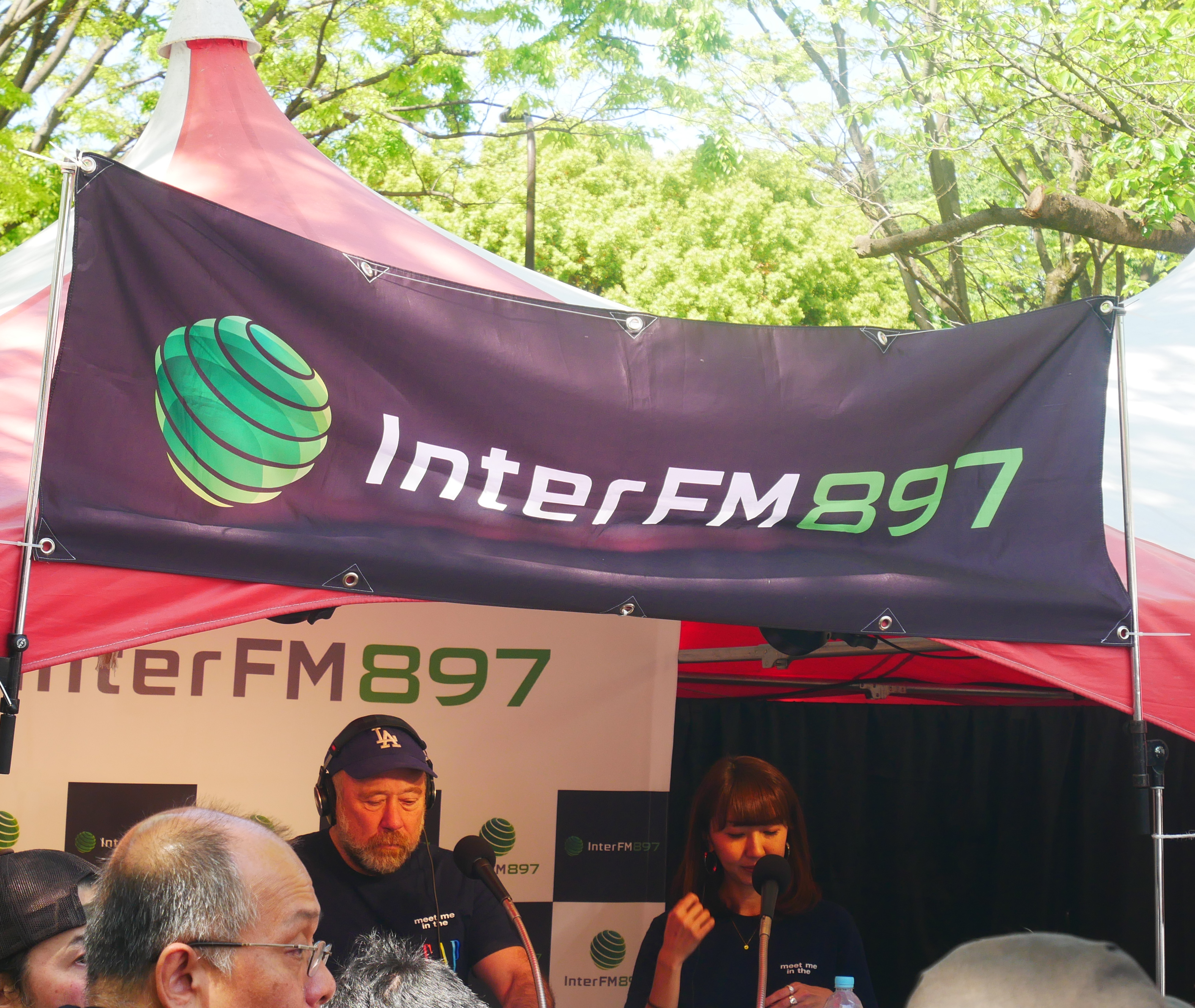 『Lazy Sunday』（レイジー・サンデー） Panasonic Lumix DMC-GX7 Mark II